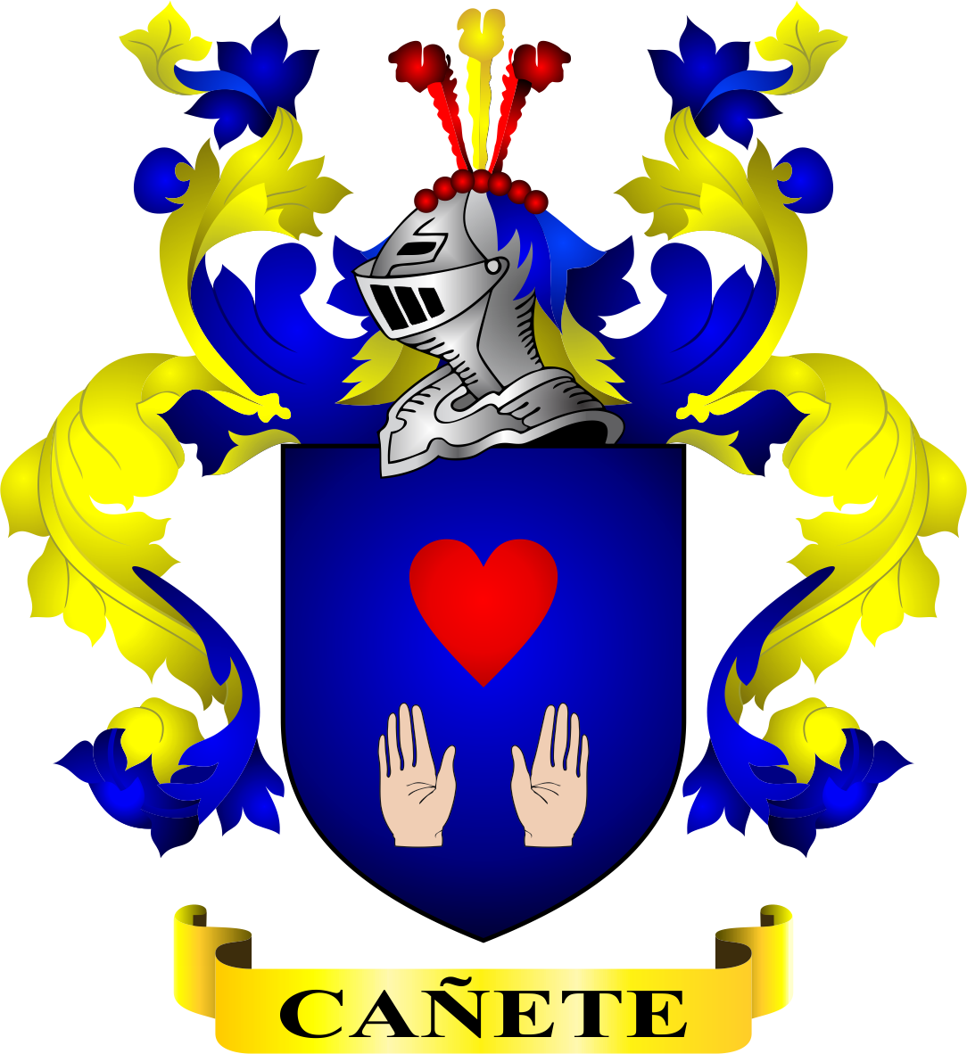 Distrito de San Vicente - Provincia de Cañete - Región Lima